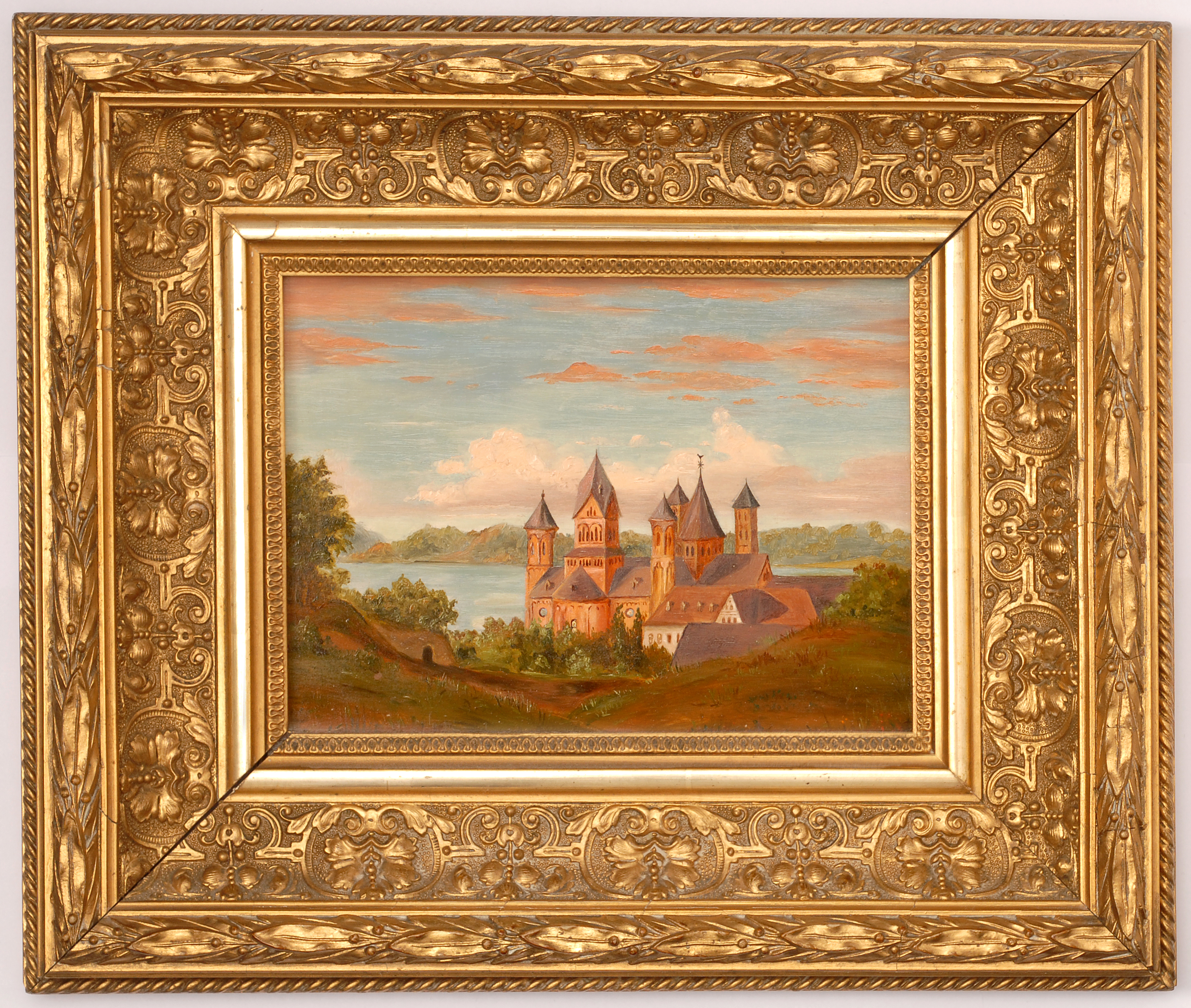 Kloster Laach, Foto eines Ölbildes auf Holz im Originalrahmen